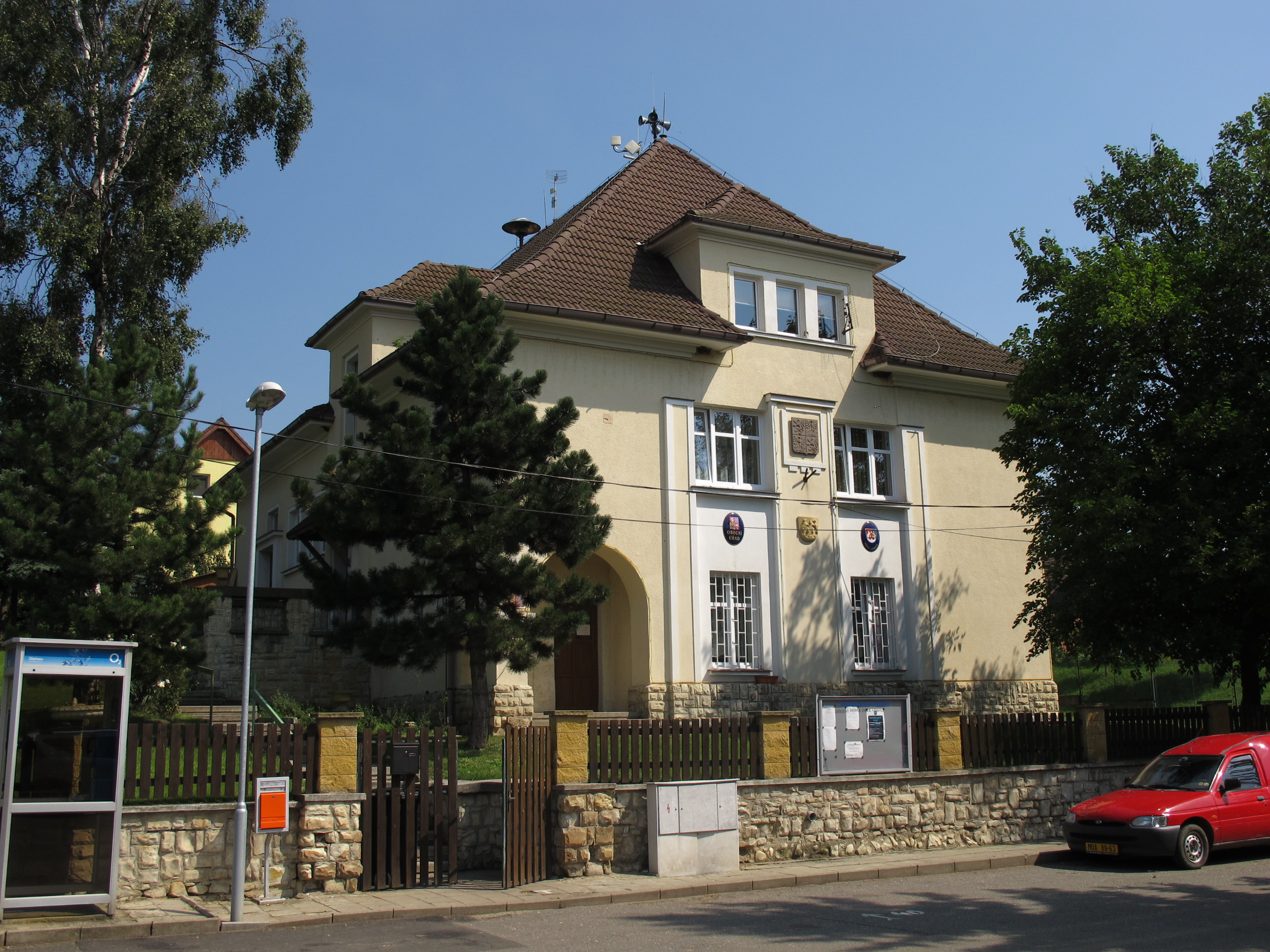 Obec Lišnice v okrese Most - obecní úřad